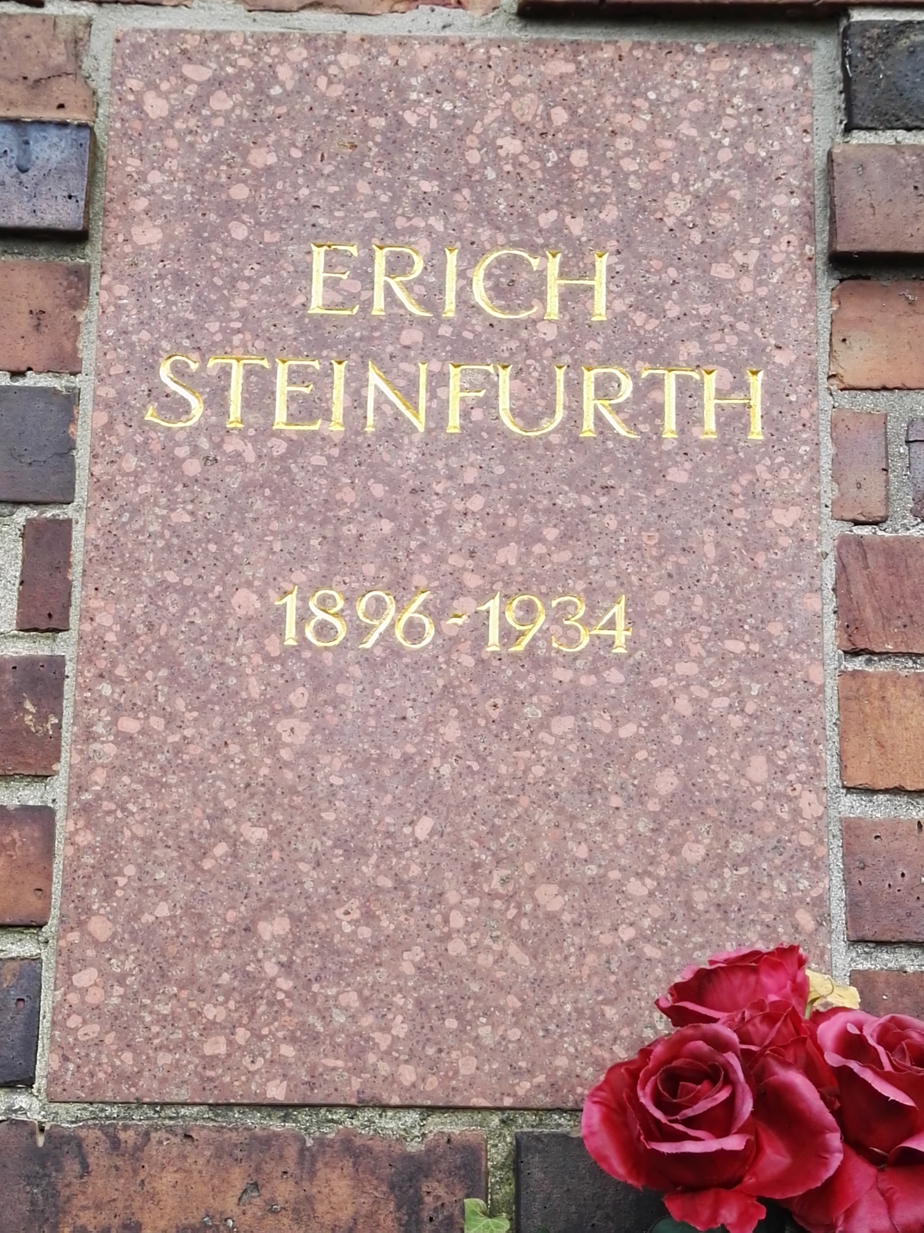 Grab von Erich Steinfurth in der Gedenkstätte der Sozialisten auf dem Zentralfriedhof Friedrichsfelde in Berlin-Lichtenberg